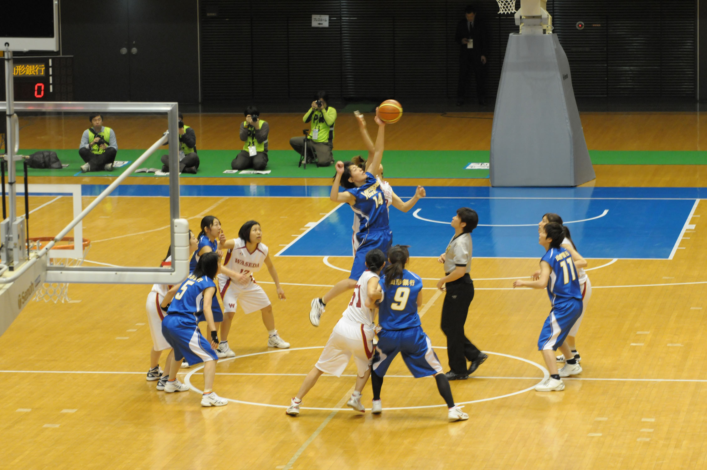 2012年全日本総合バスケットボール選手権大会2回戦、山形銀行対早稲田大学。東京体育館で。